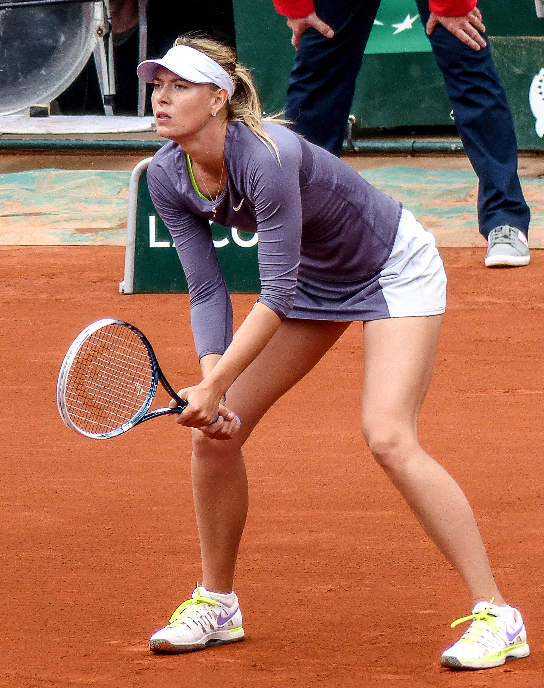 2ème tour Roland Garros 2013 : Maria Sharapova (RUS) vs Eugenie Bouchard (CAN)